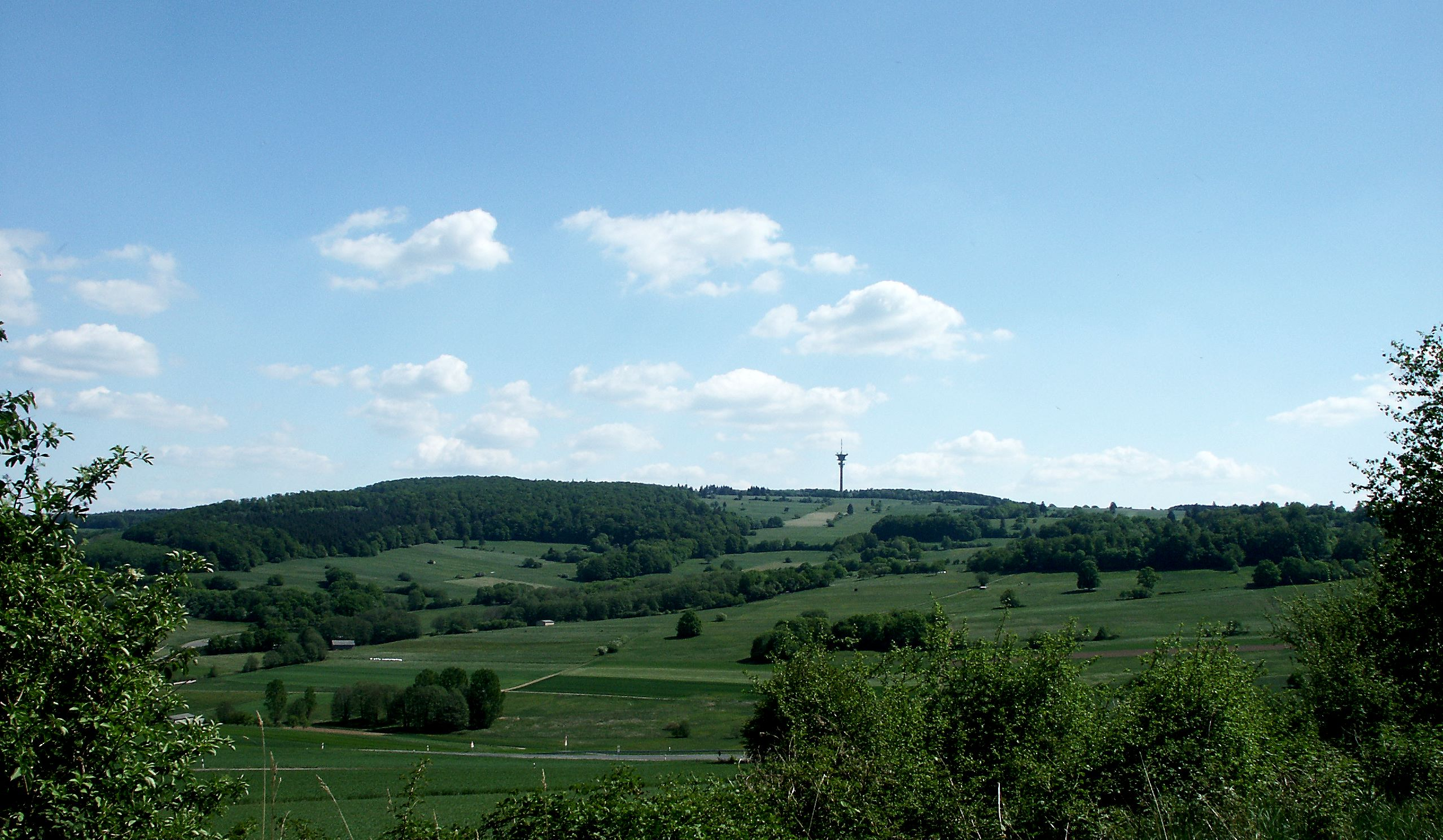 Der Eisenberg im Knüllgebirge, aus dem oberen Geistal aus fotografiert